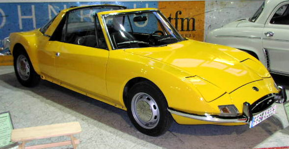 Matra 530 (1972)